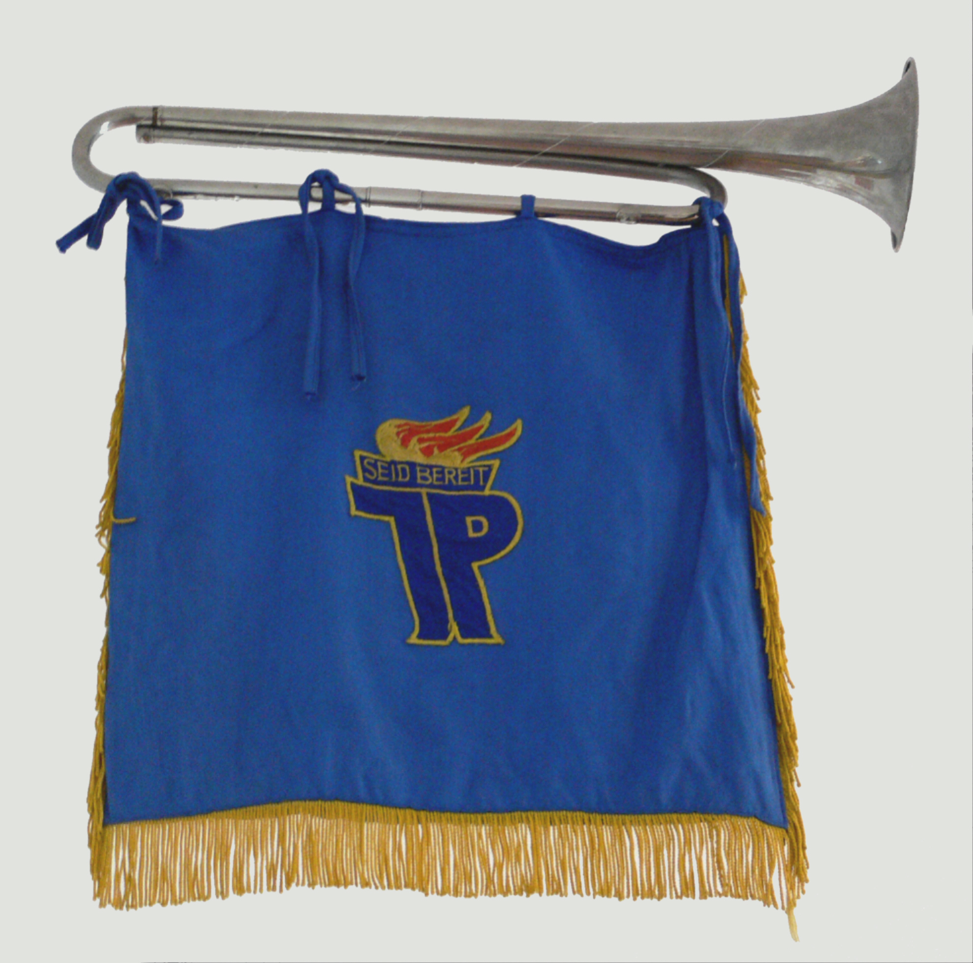 Sammlung Kindheit und Jugend (Stiftung Stadtmuseum Berlin) Fanfarentrompete eines Pionierfanfarenzugs